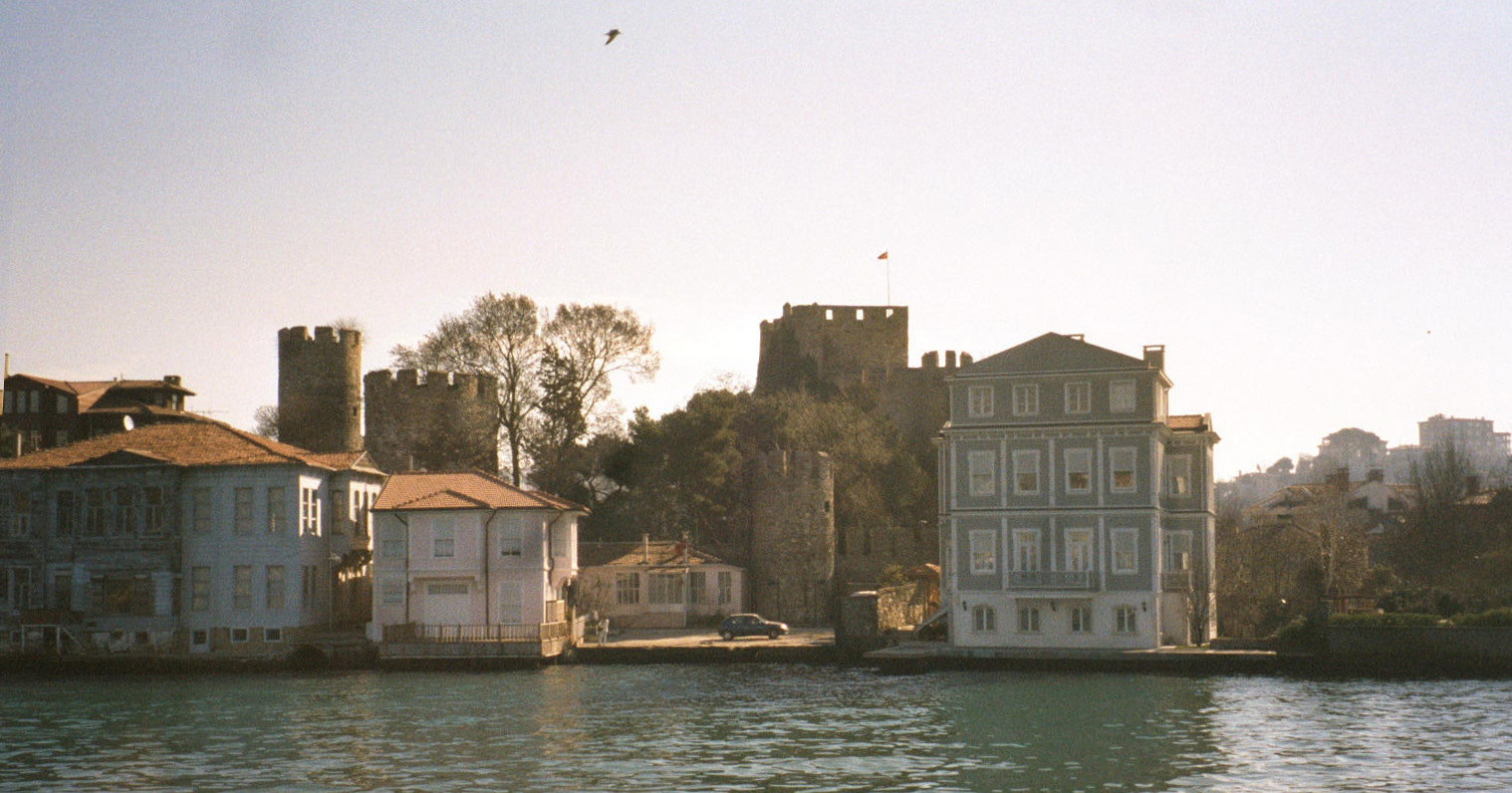 Forteresse Anadoluhisari près d'Istanbul construite par Bayezid Ier (1394), rive asiatique